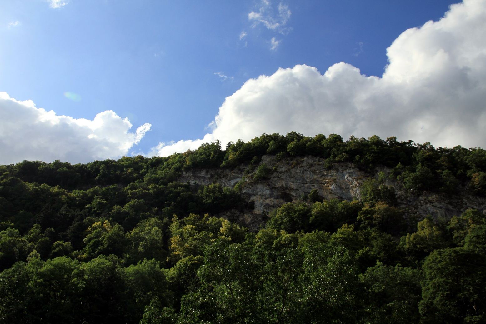 Les Caves à Barbareau, grottes au dessus de Baulmes. Probablement un des plus anciens abri habité par l'homme de la région, il y a plus de 10'000 ans.